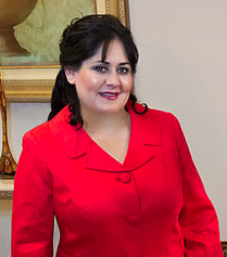 Diva Hadamira Gastélum Bajo